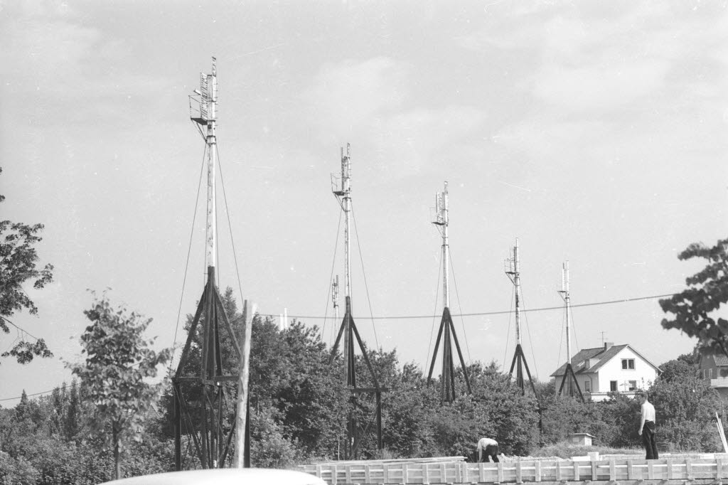 zwischen Gänsekrugredder und Schreibersbruch.